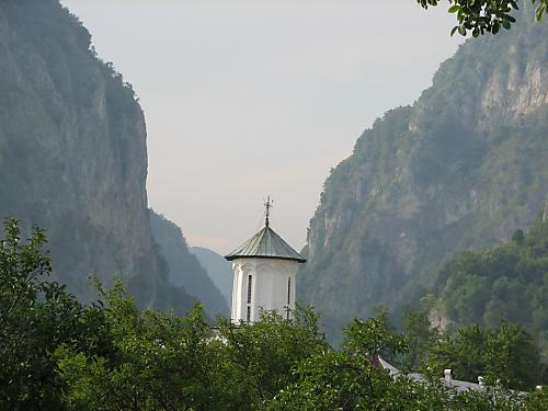 fotografia îmi aparţine